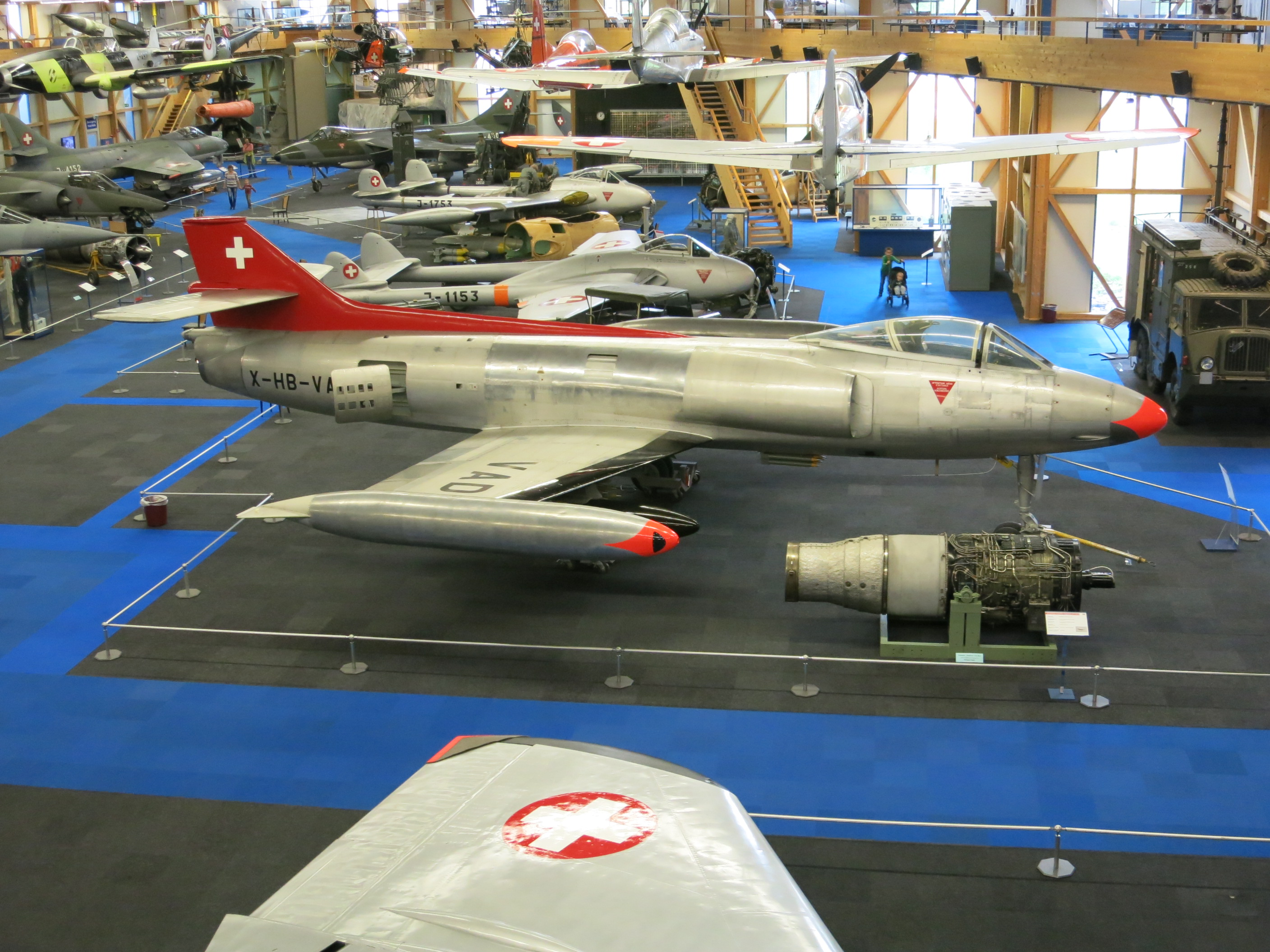 Flieger-Flab-Museum, Dübendorf ZH, Schweiz